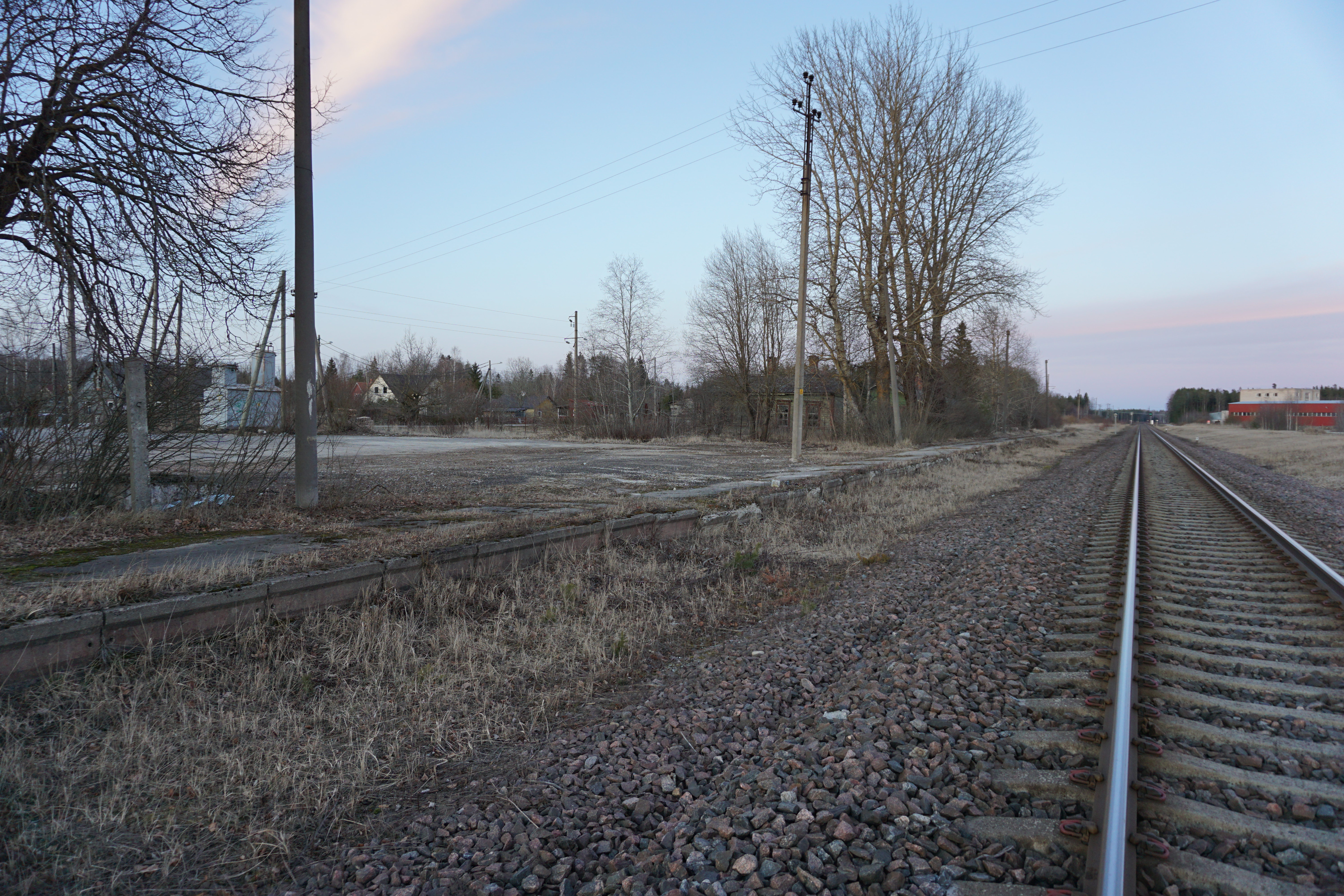 Endise Toila jaama perroonijäänused